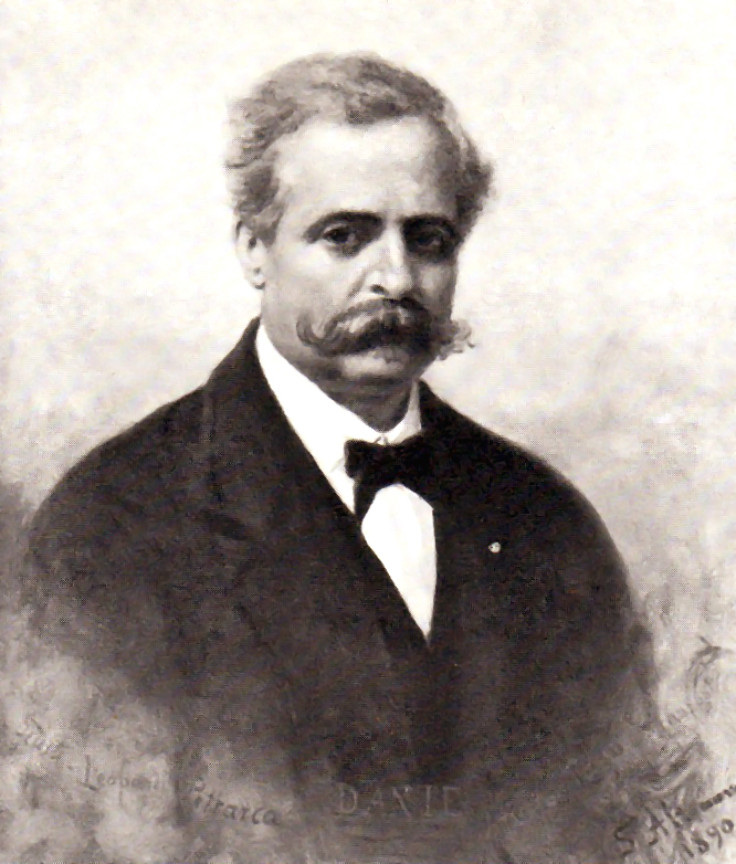 Ritratto di Francesco De Sanctis, opera di Saverio Altamura, 1890 (Napoli, Museo Nazionale di San Martino). Immagine tratta dalla letteratura italiana Garzanti. Passata allo scanner e modificata. Immagine PD